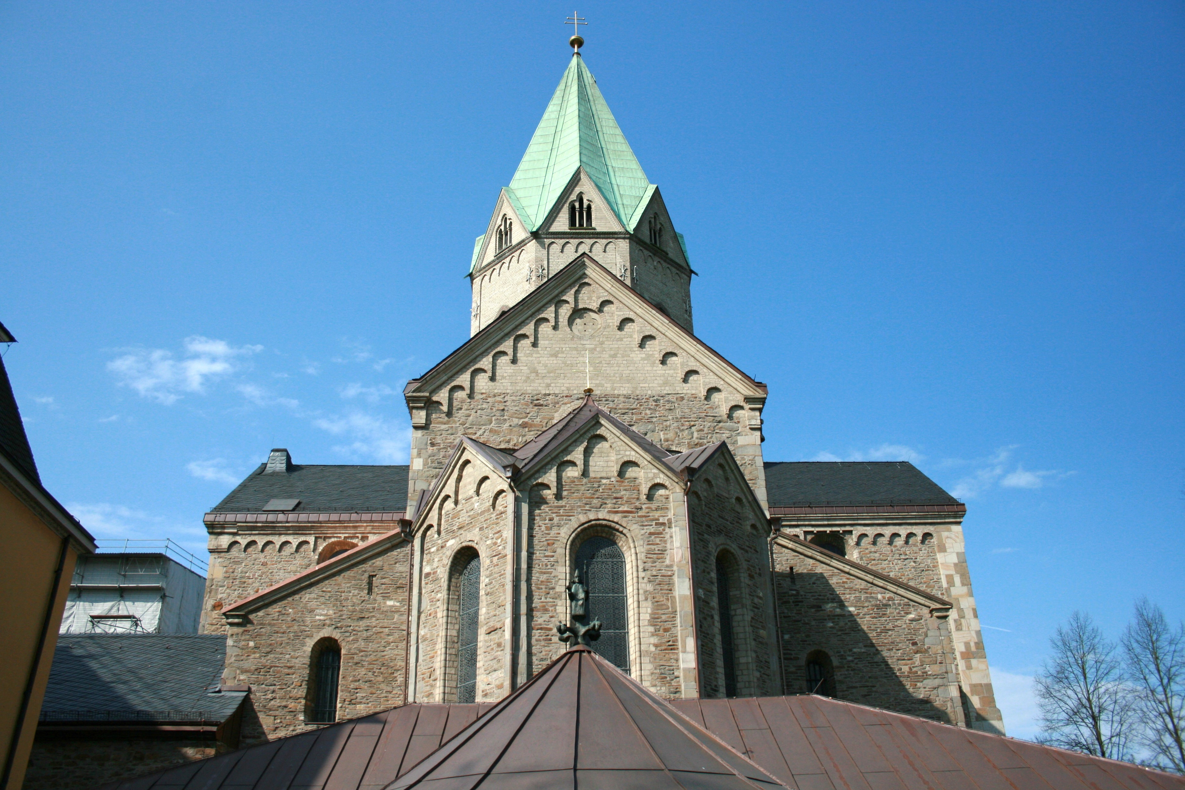 Basilika Sankt Ludgerus, Kloster Werden, Essen-Werden